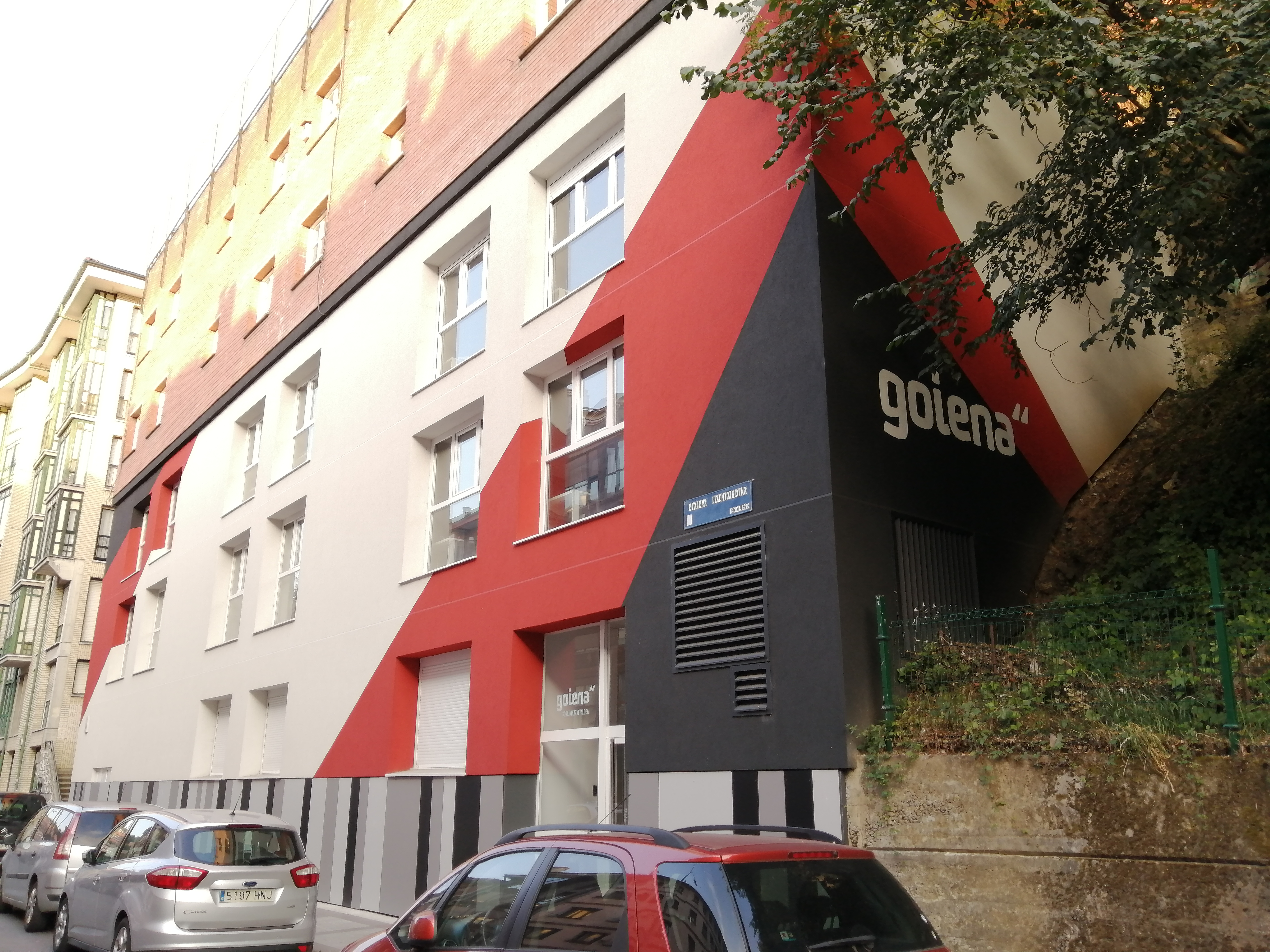 Goiena komunikabideen bulegoak